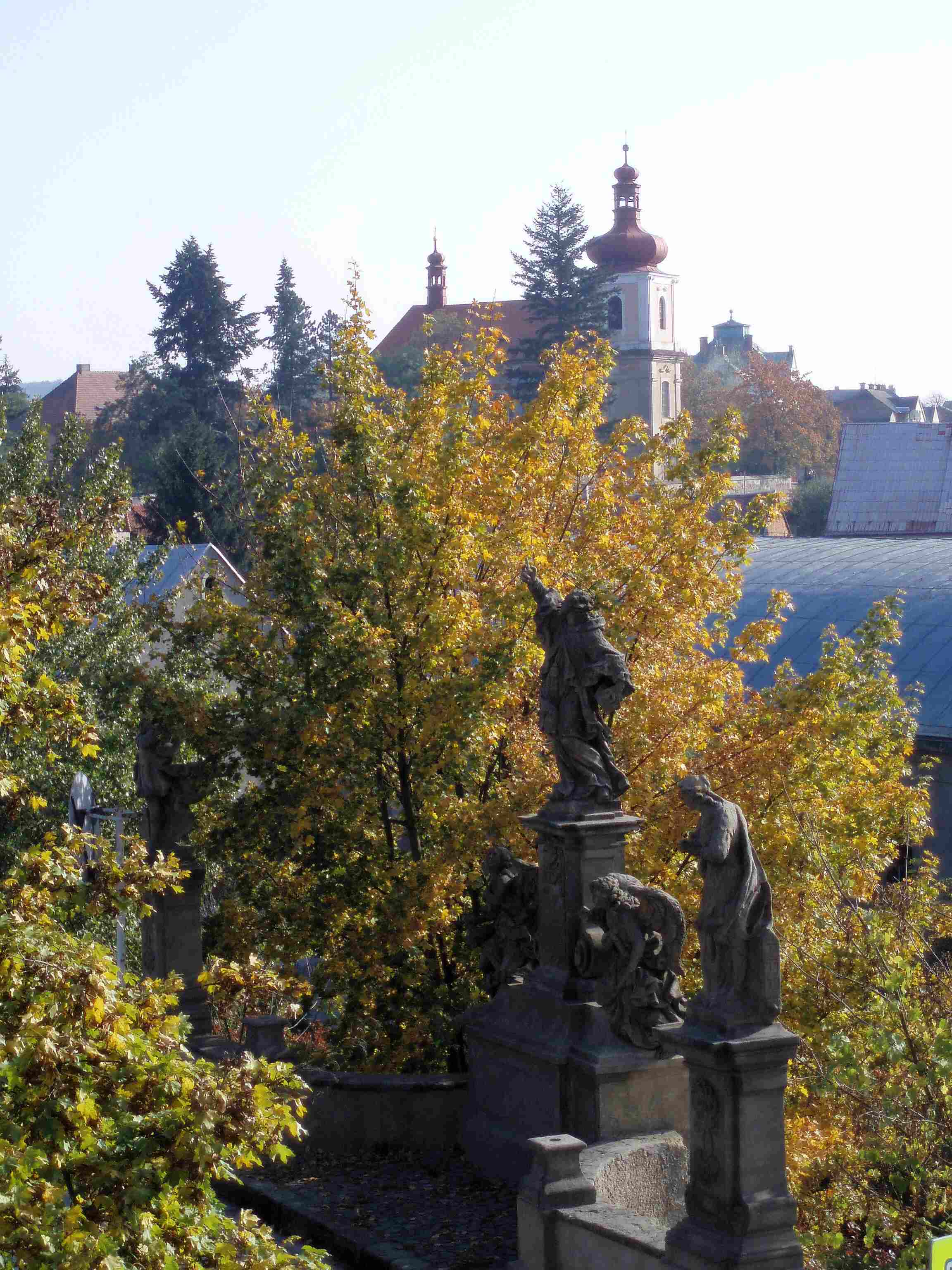 Münchengrätz